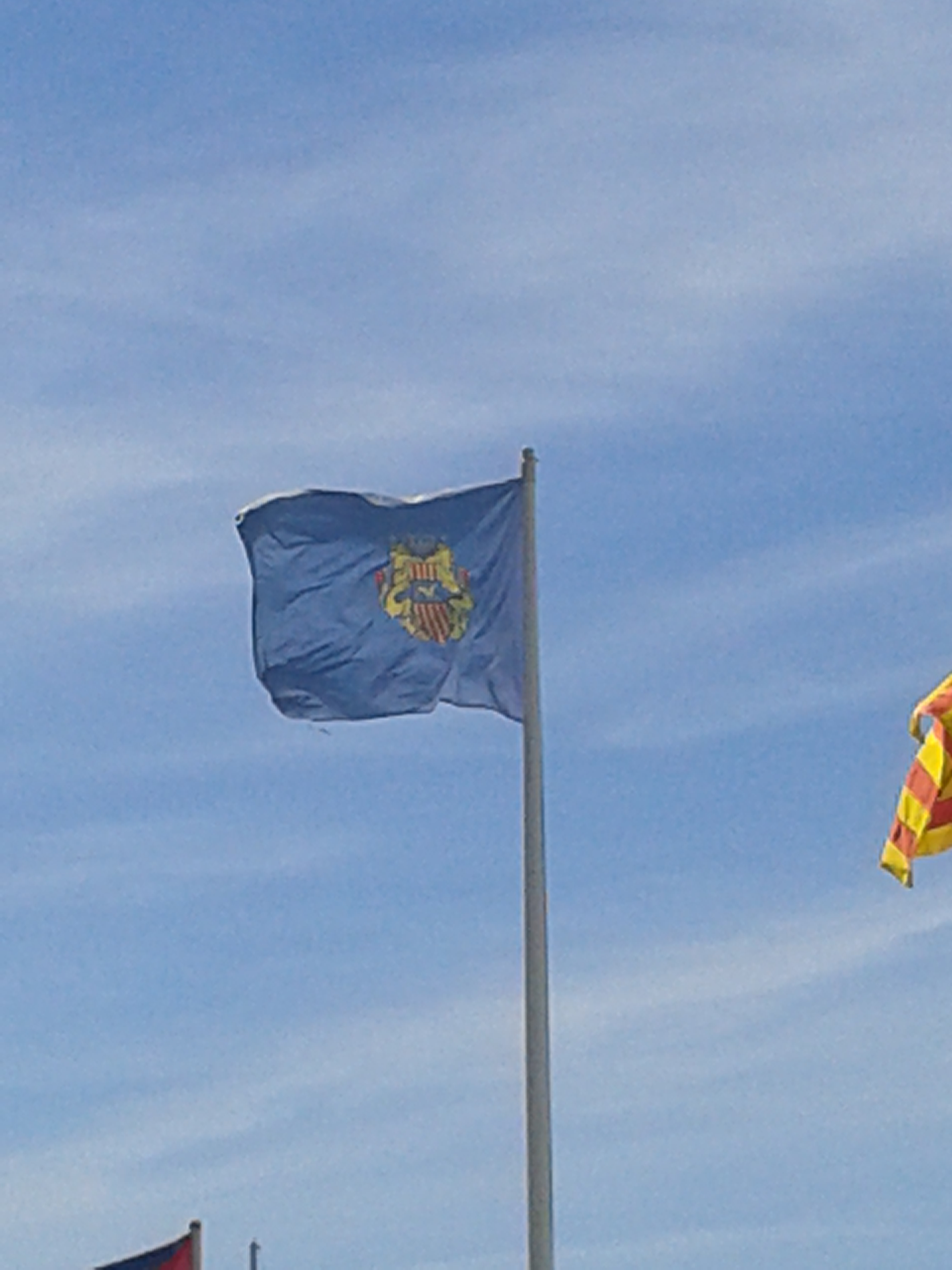 bandera de Cambrils.